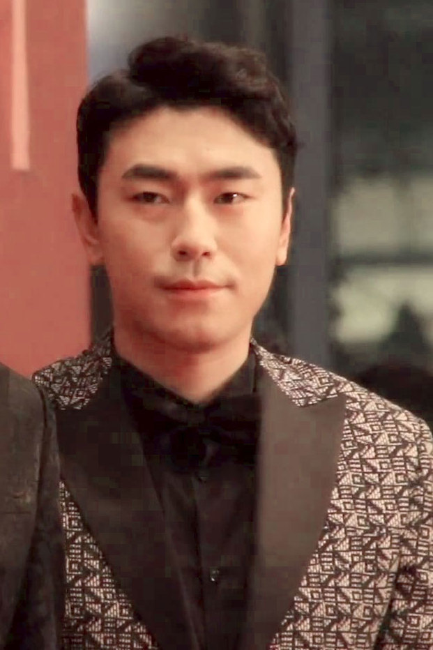 2017 MBC 연기대상 - 투깝스 이시언, 김선호